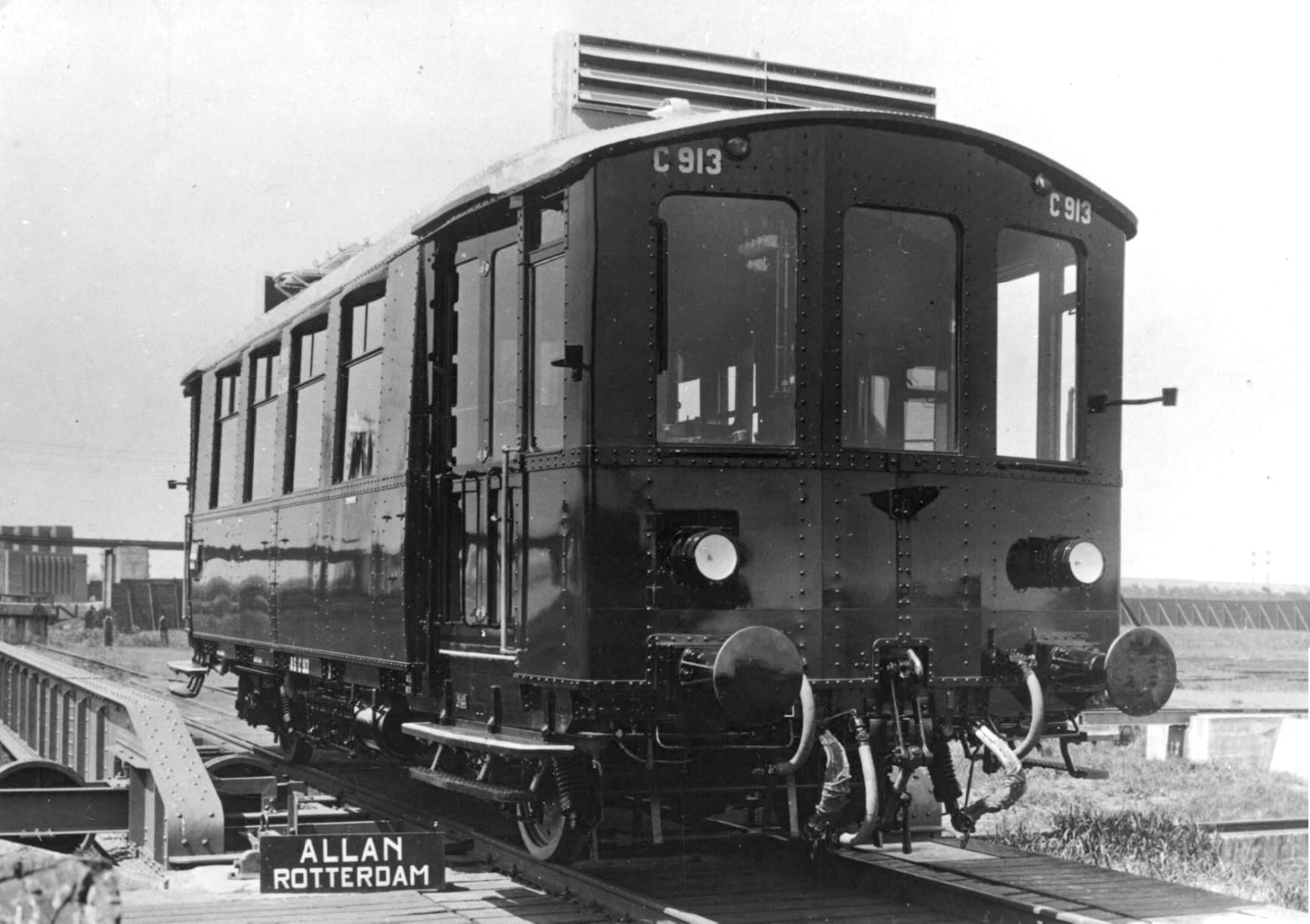 Foto van de Omc 913 voor de Nederlandse Spoorwegen op het terrein van Allan in Rotterdam. Foto gemaakt door Allan. Het object, uitgegeven door een instantie, is vanaf 70 jaar na publicatie niet meer auteursrechtelijk beschermd.